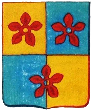 Blason d'Argouges - Château de Gratot